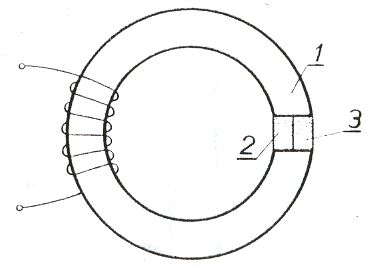 Figura 5. Qarku magnetik i përbërë me degë paralele